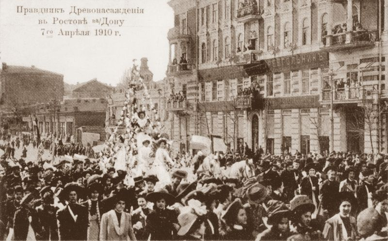 Ростов-на-Дону, Праздник деревонасаждения